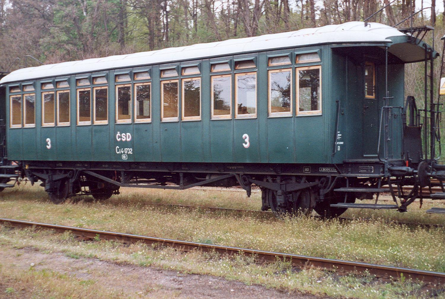 Personenzugwagen mit Holzklasse